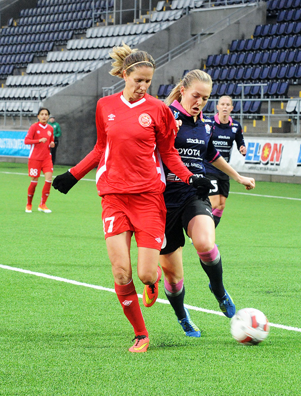 a_22_0226